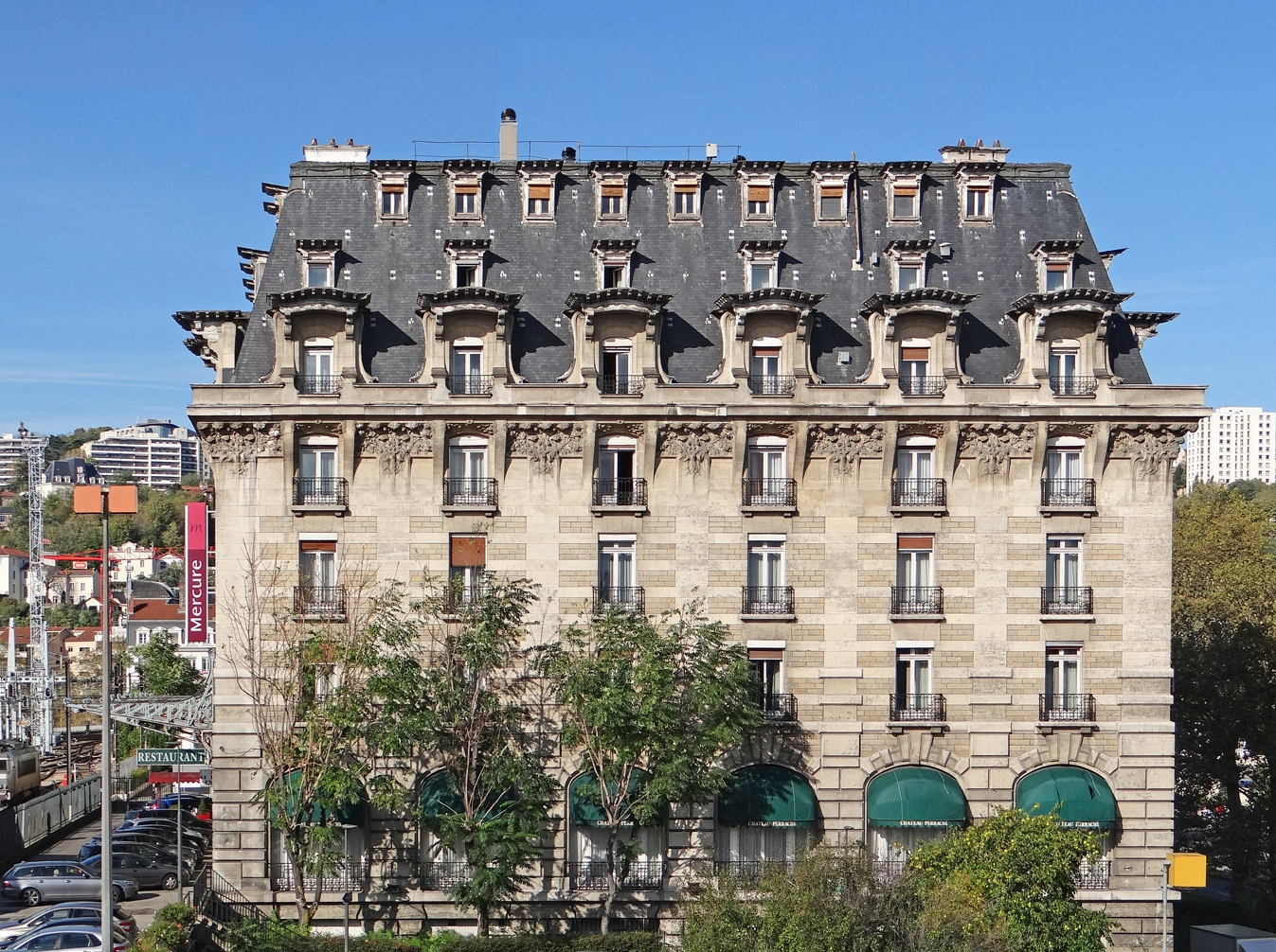 La façade est de l'hôtel Mercure Château-Perrache Cet immeuble, à structure métallique cachée par des revêtements de différentes pierres de taille, est construit autour d'une cour intérieure. La corniche supérieure concentre l´essentiel du décor sculpté. Le bâtiment est adossé au mur de soutènement de la voie ferrée, à gauche sur la photo. Les caves se trouvent de plain-pied avec le cours de Verdun, à droite sur la photo, où se trouve une entrée protégée par une marquise art nouveau dont la finesse des ferronneries en forme de feuilles de vigne est remarquable. L'entrée actuelle de l'hôtel est au rez-de-chaussée, du côté sud (à gauche). ____________ La Compagnie P. L. M. décide vers 1902 la construction d'un hôtel de luxe proche de la gare de Perrache au 12, cours de Verdun à Lyon (Hôtel Terminus du PLM) L'architecte retenu est Georges CHEDANNE (1861-1940), Grand Prix de Rome en 1887. Assisté de l'architecte lyonnais M. Curieux, il conçoit un immeuble à structure métallique très novateur pour l'époque qui est achevé en 1906. En 1937, l'hôtel rentre au patrimoine de la SNCF, son exploitation est successivement concédée à plusieurs sociétés. C'est aujourd'hui un hôtel Mercure (Groupe Accor). Au moment de la construction, les meilleurs artistes et décorateurs contribuent au décor intérieur de l'hôtel Terminus dont une partie a été conservée. Le bâtiment a été inscrit sur l'inventaire supplémentaire des monuments historiques (façades, toitures, plusieurs salons du 2ème niveau) Le dossier de l'inventaire général du patrimoine (Rhône-Alpes) Le site de l'hôtel Mercure Château-Perrache